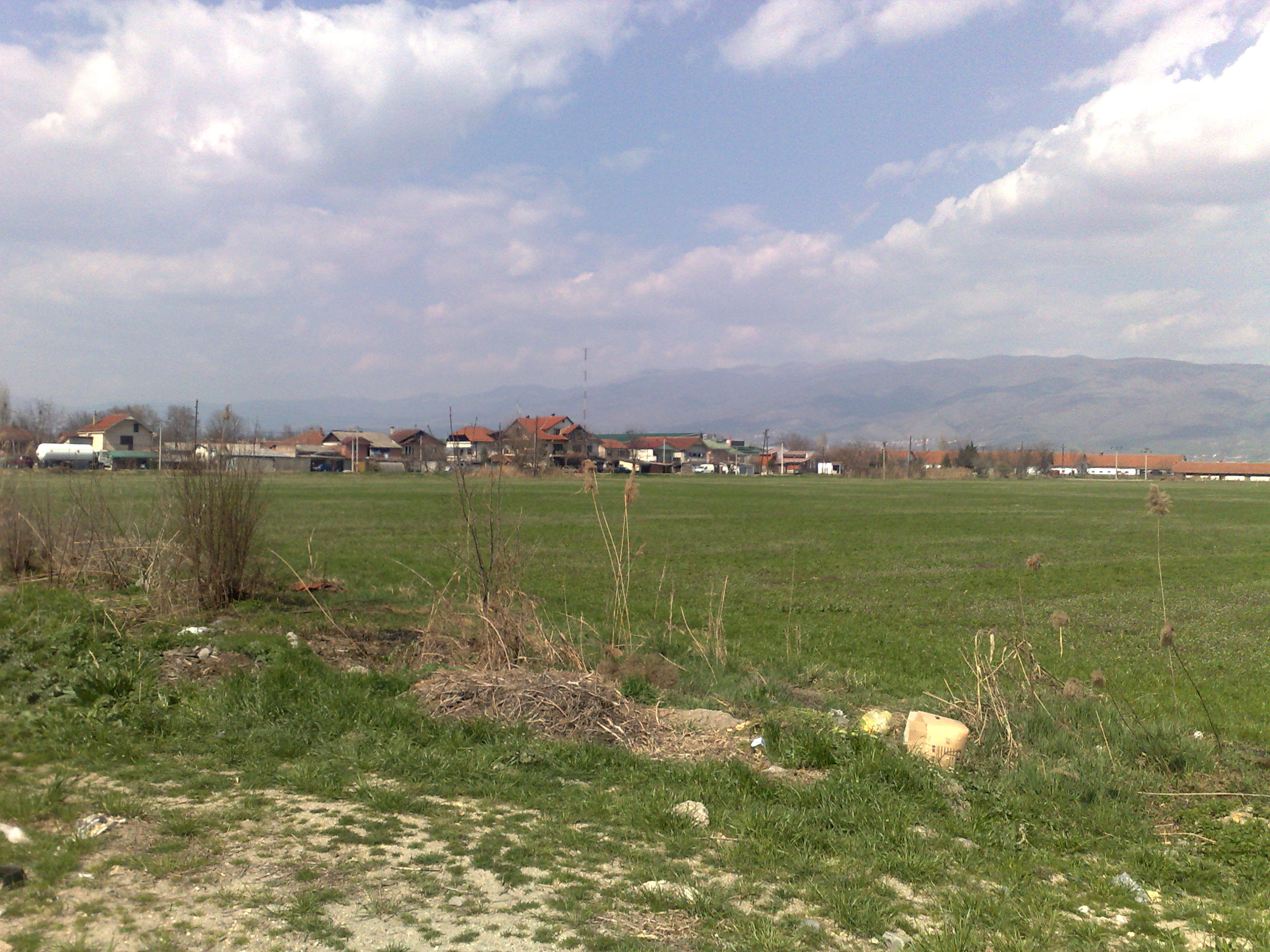 село Трубарево